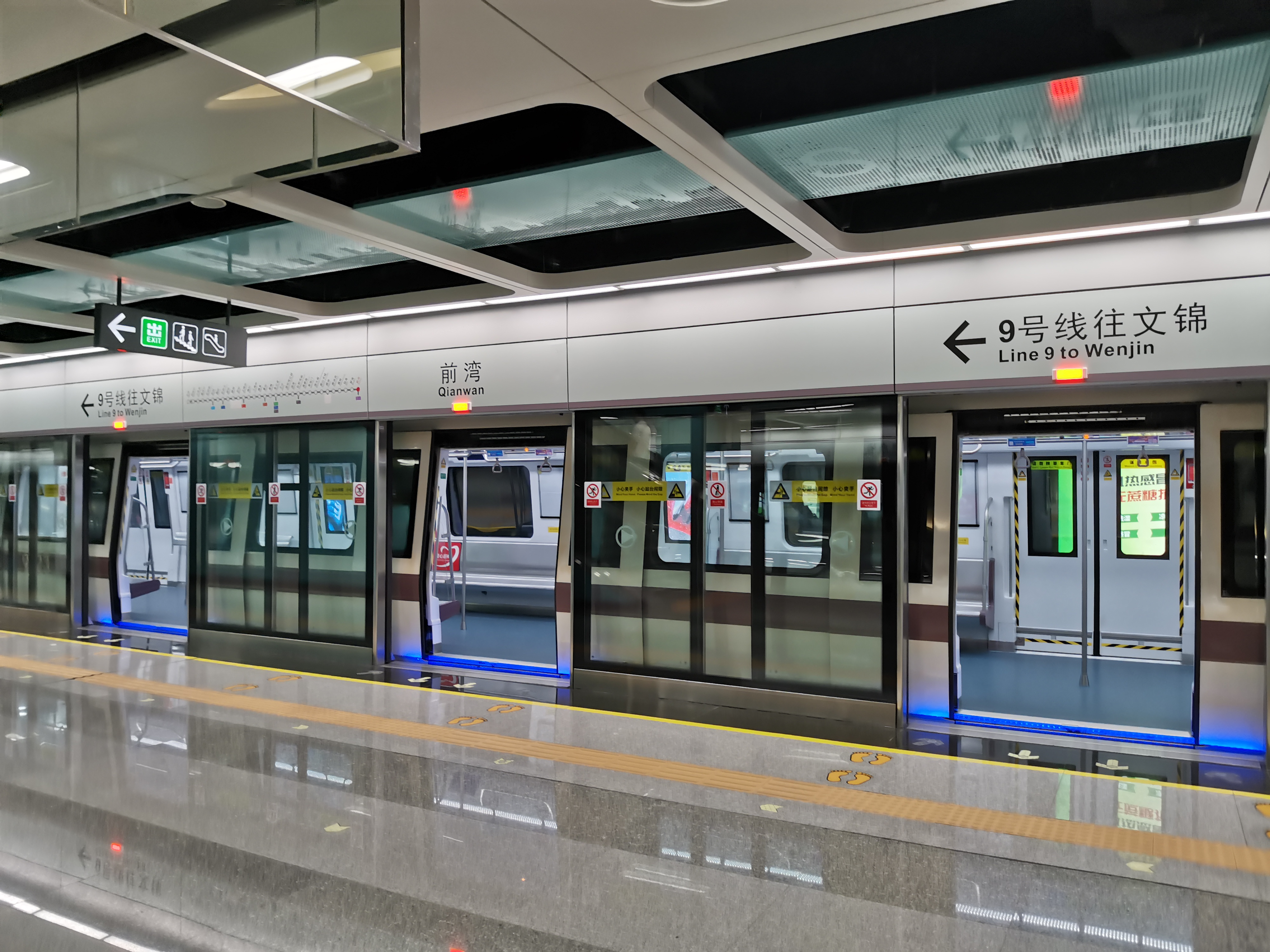 前灣站 9号线始发月台